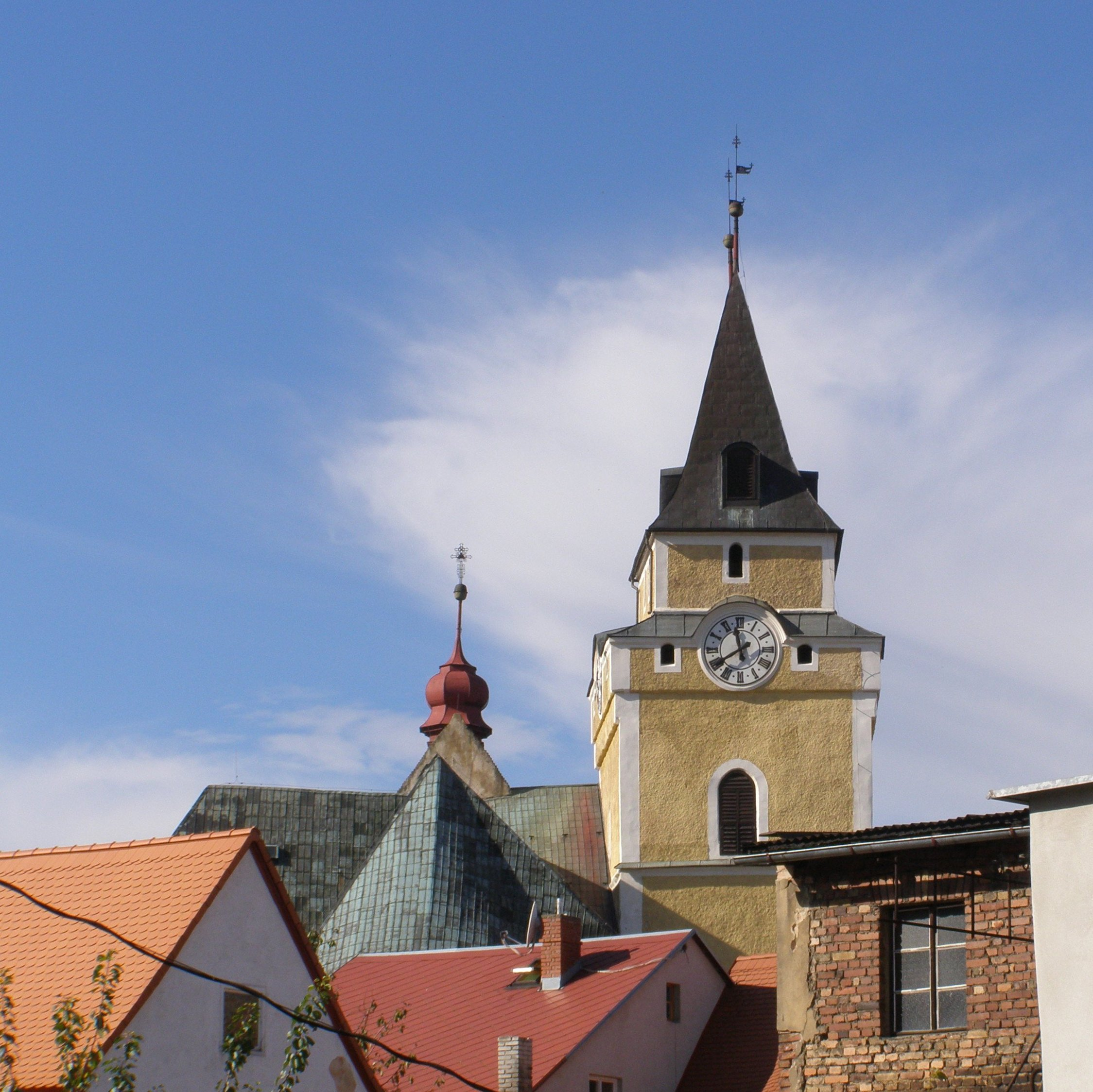 Česky: Frýdlant, pohled z ulice Hejnická na kostel